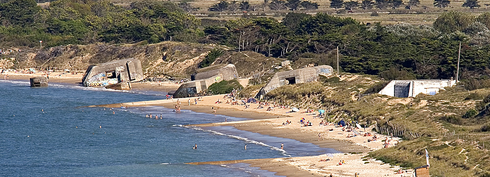 Bunker der deutschen Wehrmacht auf der Île de Ré. Fotografiert von User:Pep.per de Ré ( hochgeladen von User:Ile-de-re